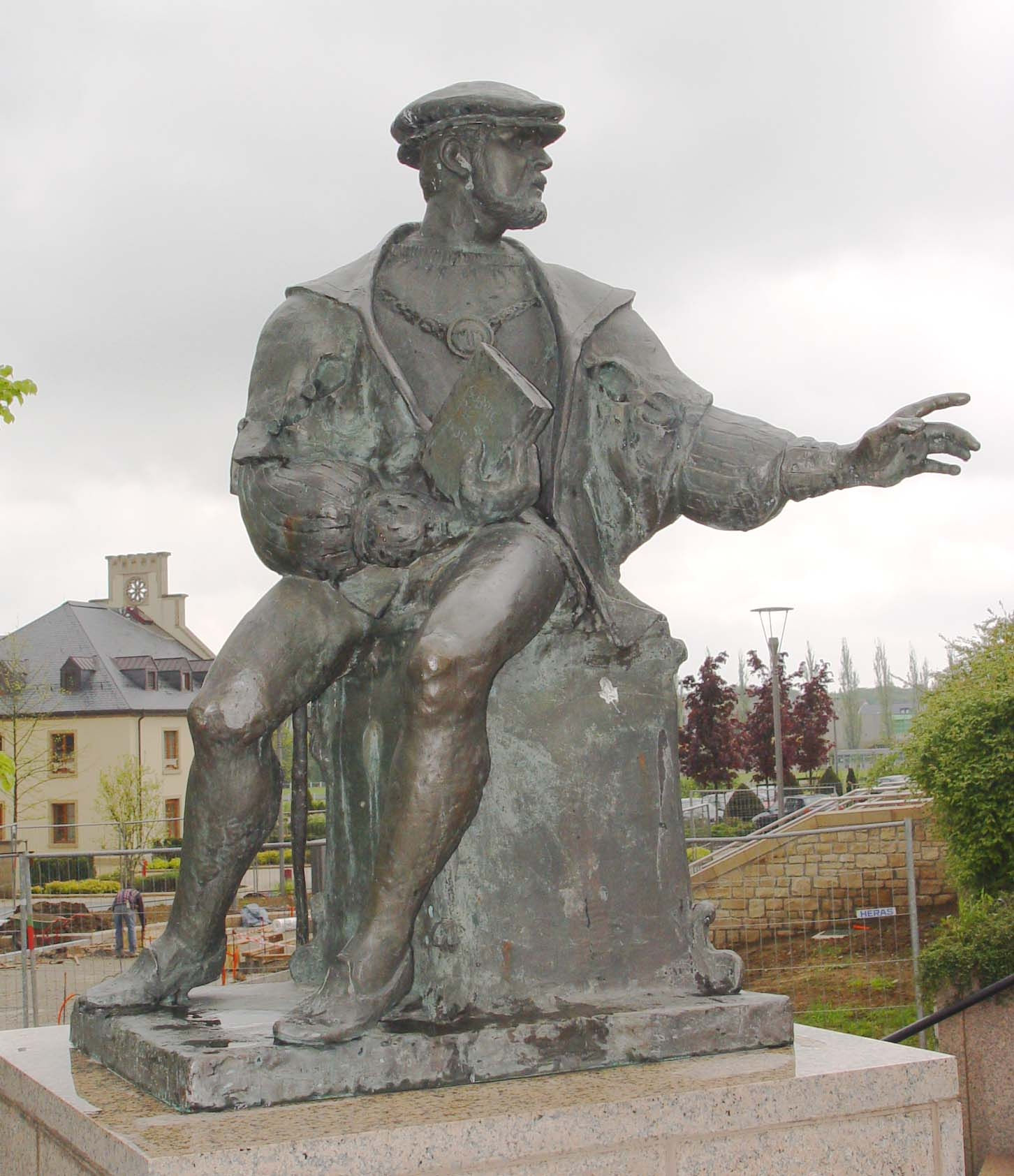 Mameranus-Statu zu Mamer bei der Kierch. Kategorie:Gemeng Mamer